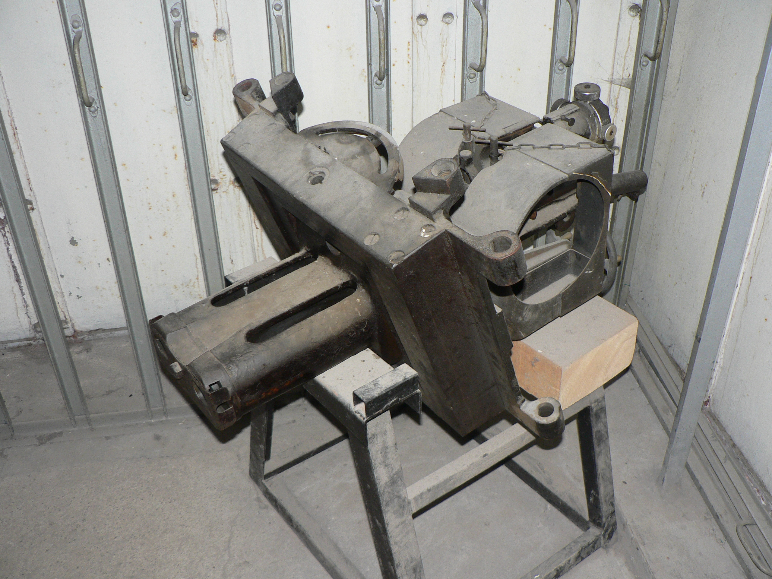 Fort Saint-Gobain, Modane A Mac 31 / Reibel machine gun